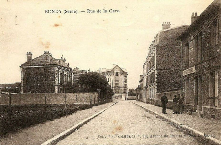 Bondy.Rue de la Gare.Pavés